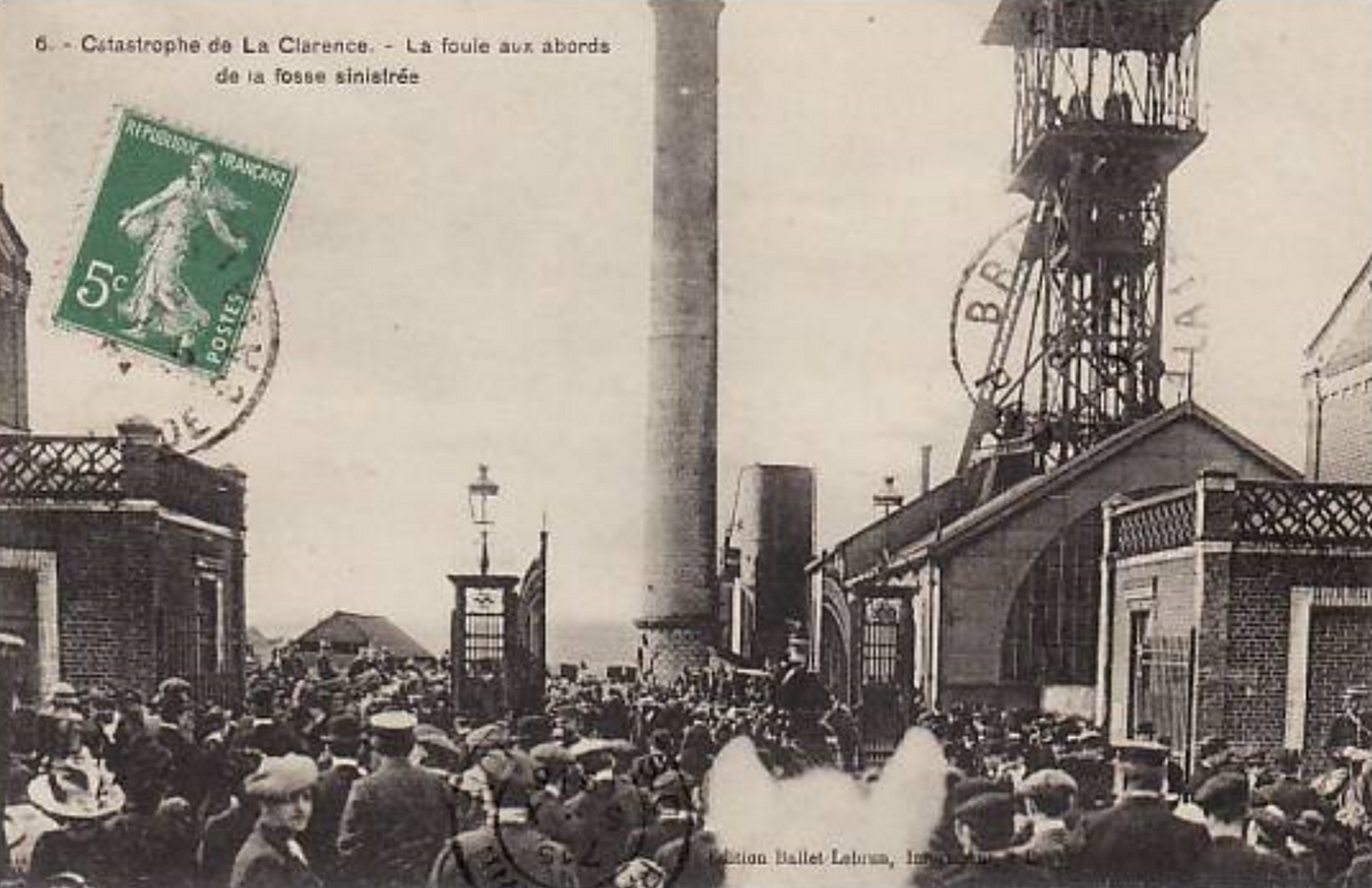 La Fosse n° 1 - 1 bis de la Compagnie des mines de La Clarence était un charbonnage constitué de deux puits situé à Divion, Pas-de-Calais, Nord-Pas-de-Calais, France. Catastrophe du 3 septembre 1912.